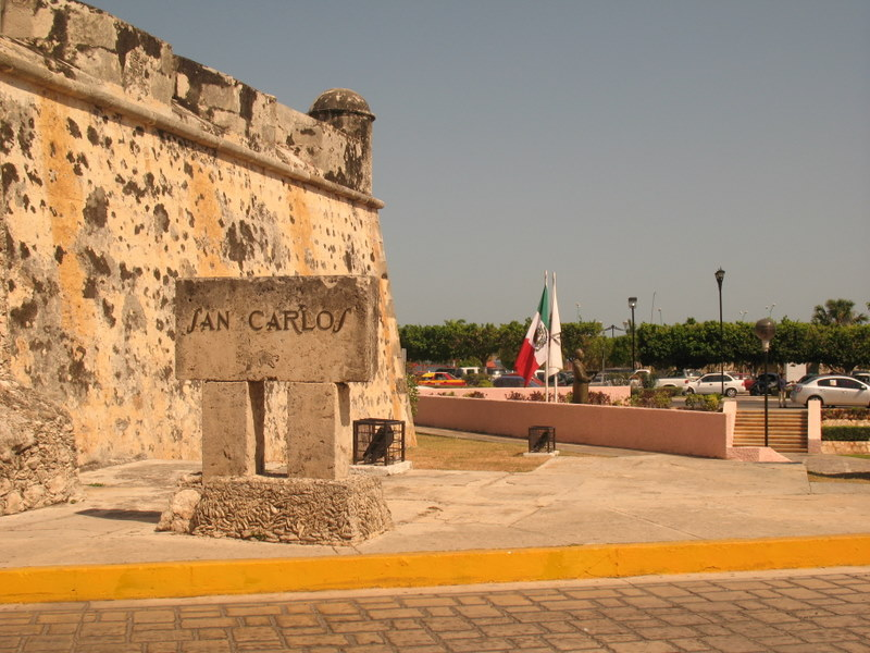 Baluarte de San Carlos — San Francisco de Campeche, estado de Campeche, México.